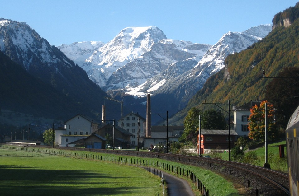 Fahrt gegen Linthal; alte Fabrik und Tödi